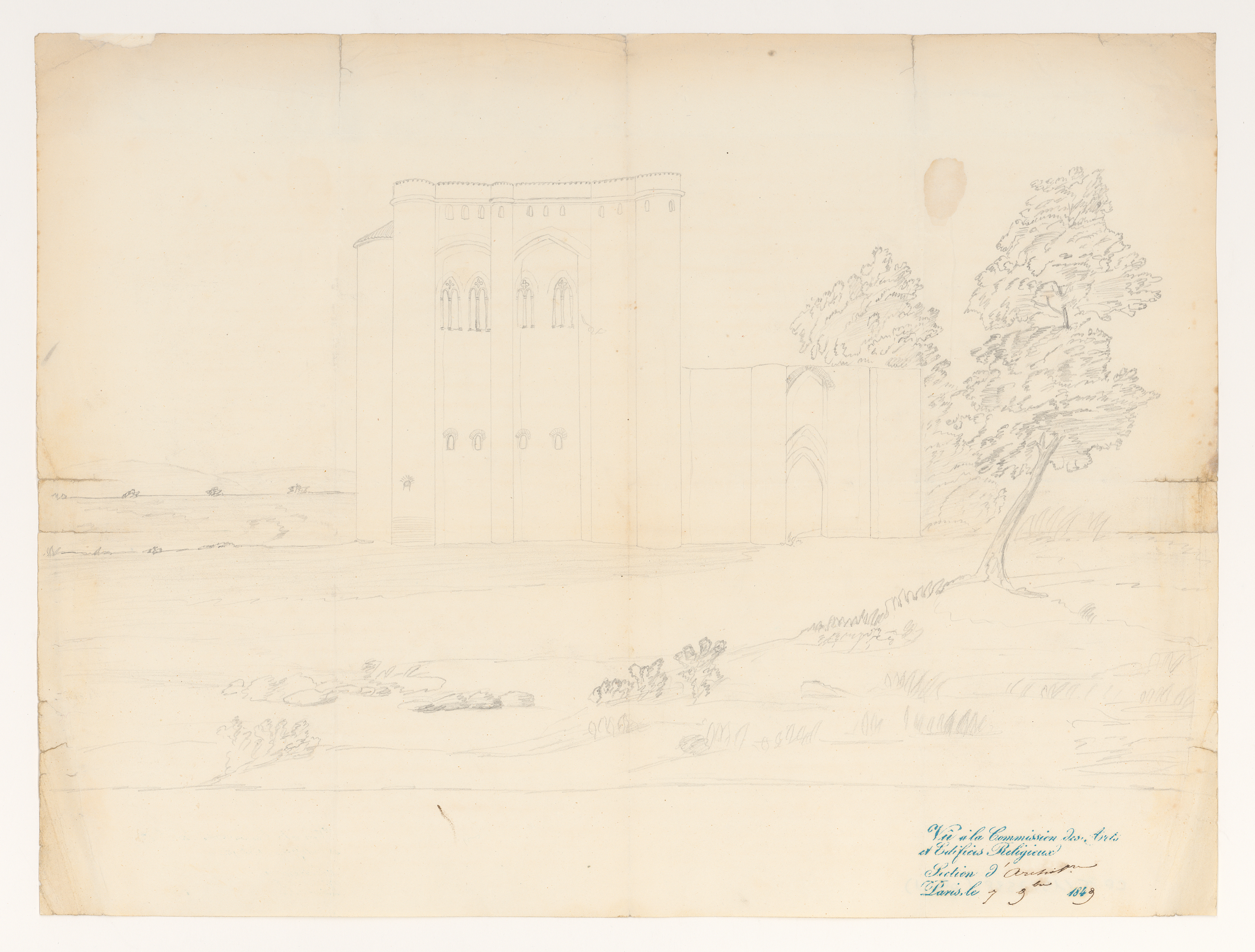 Croquis représentant l'extérieur de la cathédrale. Plan issu des dossiers de travaux de restauration des cathédrales (1802-1912), conservés aux Archives nationales (inventaire et autres documents numérisés consultables en ligne).